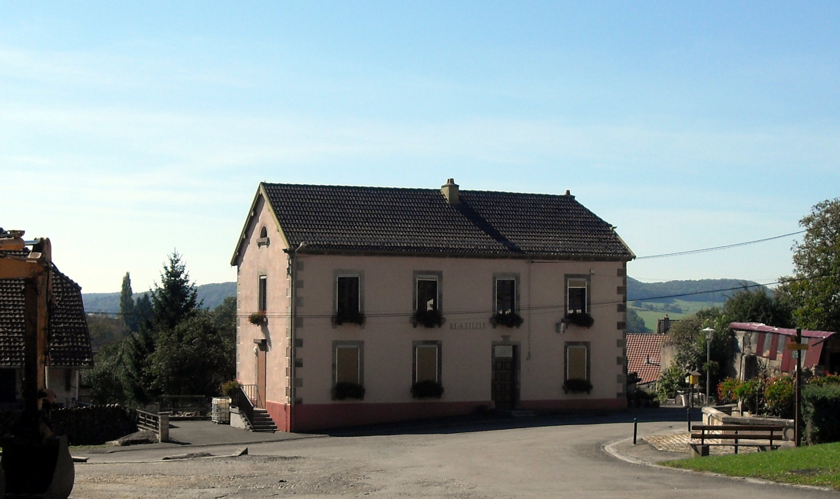 La mairie de Chavanne